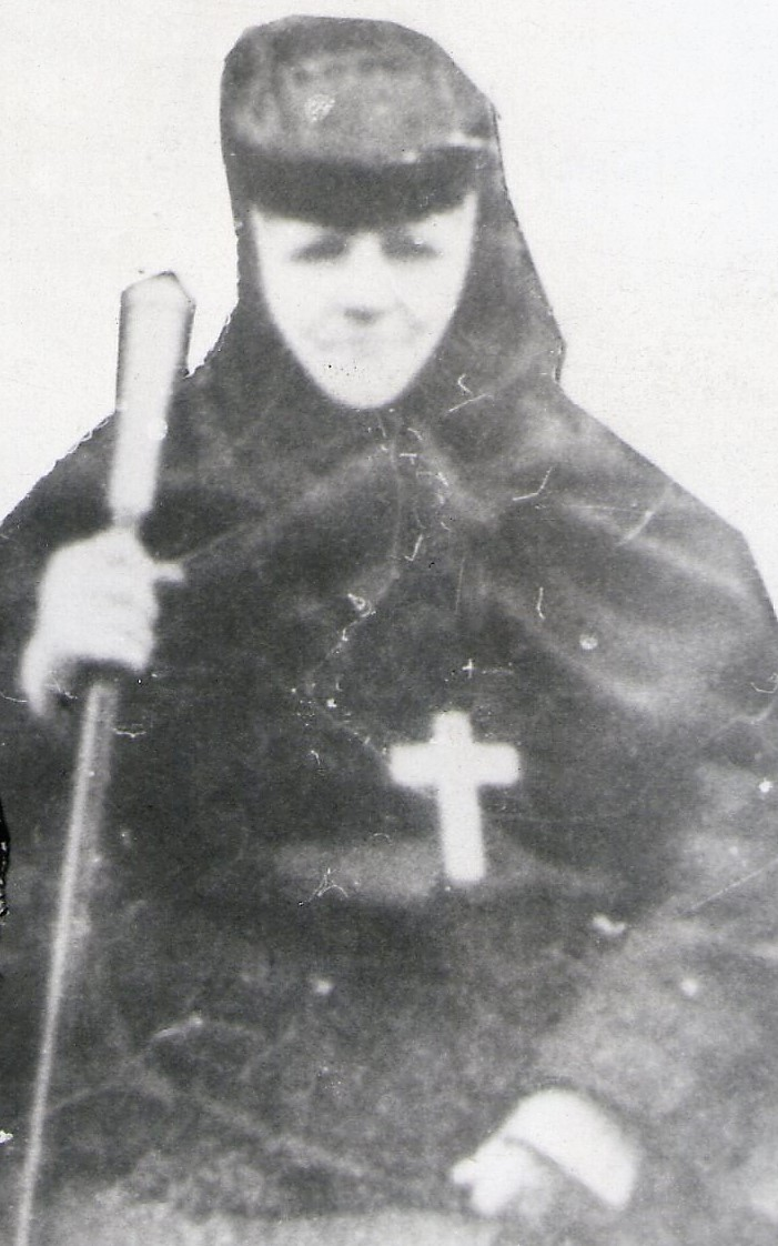 Monahia Fevronia Miclăuș, stareță a Mănăstirii Jitianu între anii 1933-1948.